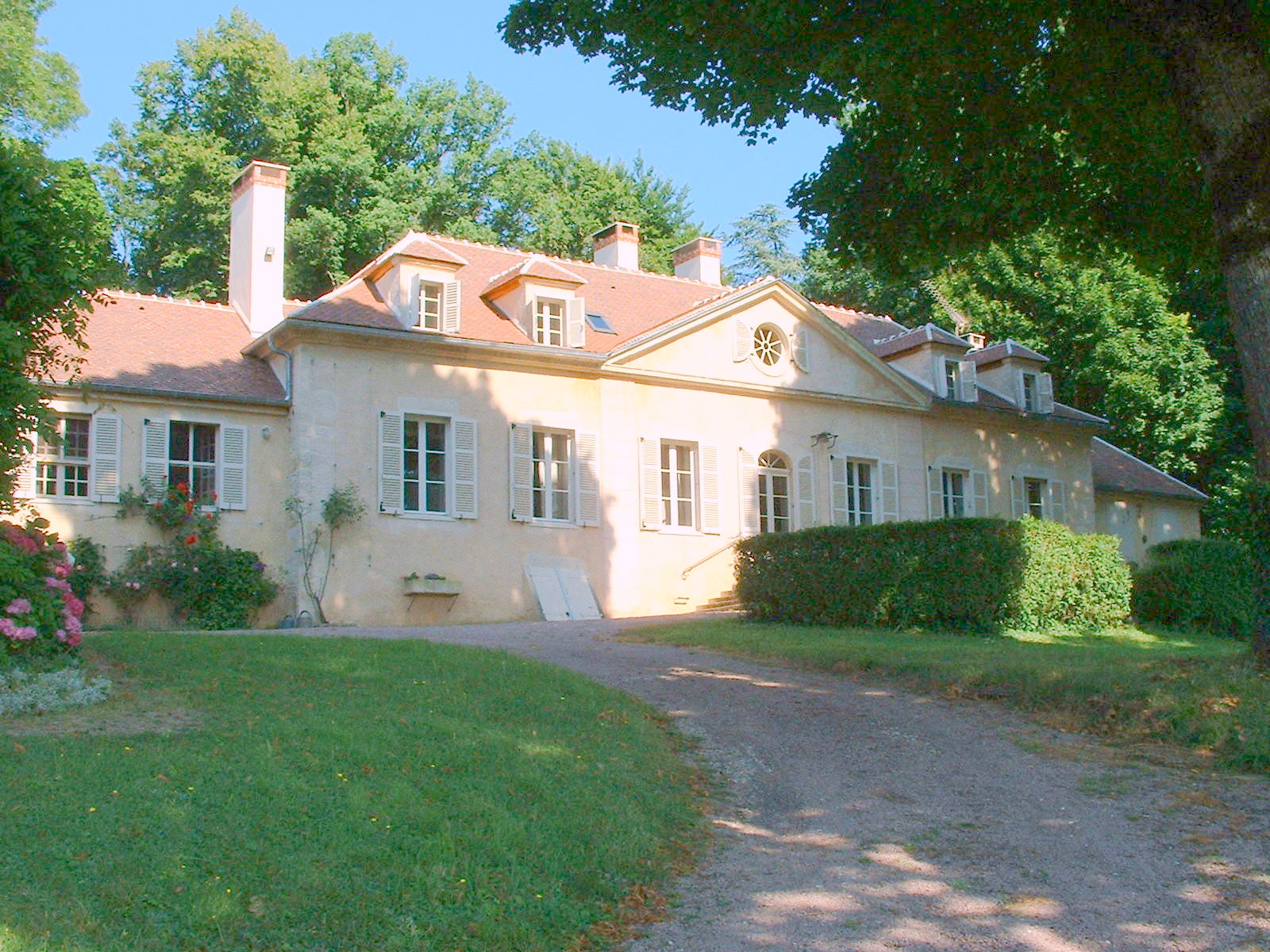 Maison du général Pierre Joseph Habert, à Montréal (Yonne)